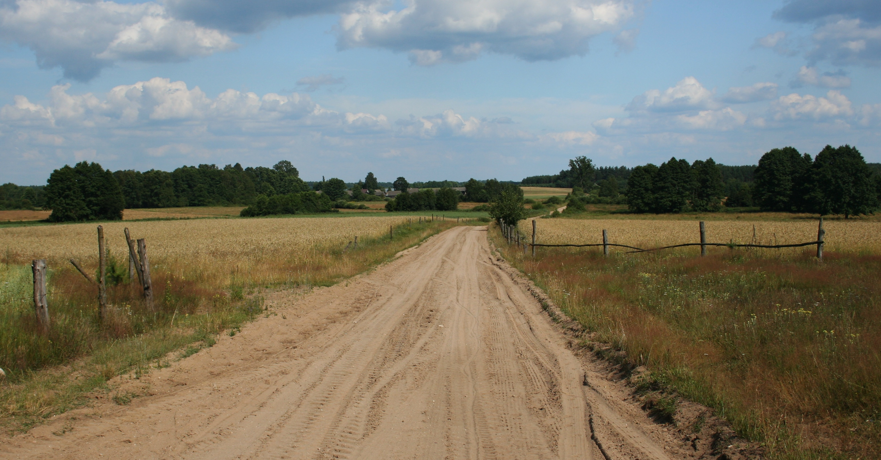 Podlaski Szlak Bociani (Bociani Szlak rowerowy), droga między miejscowościami Odrynki i Supruny, woj. podlaskie